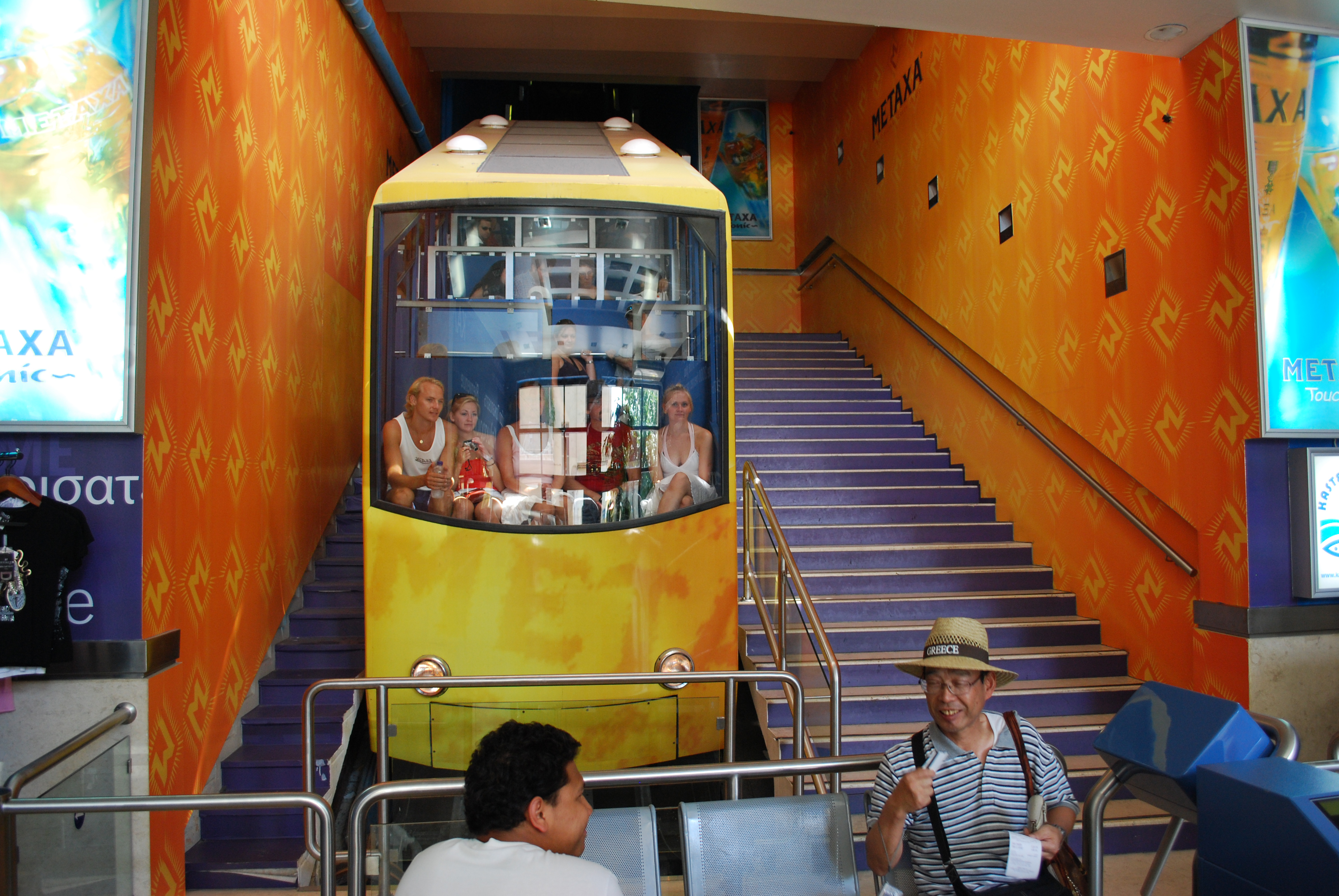 Le funiculaire du Lycabette à Athènes.